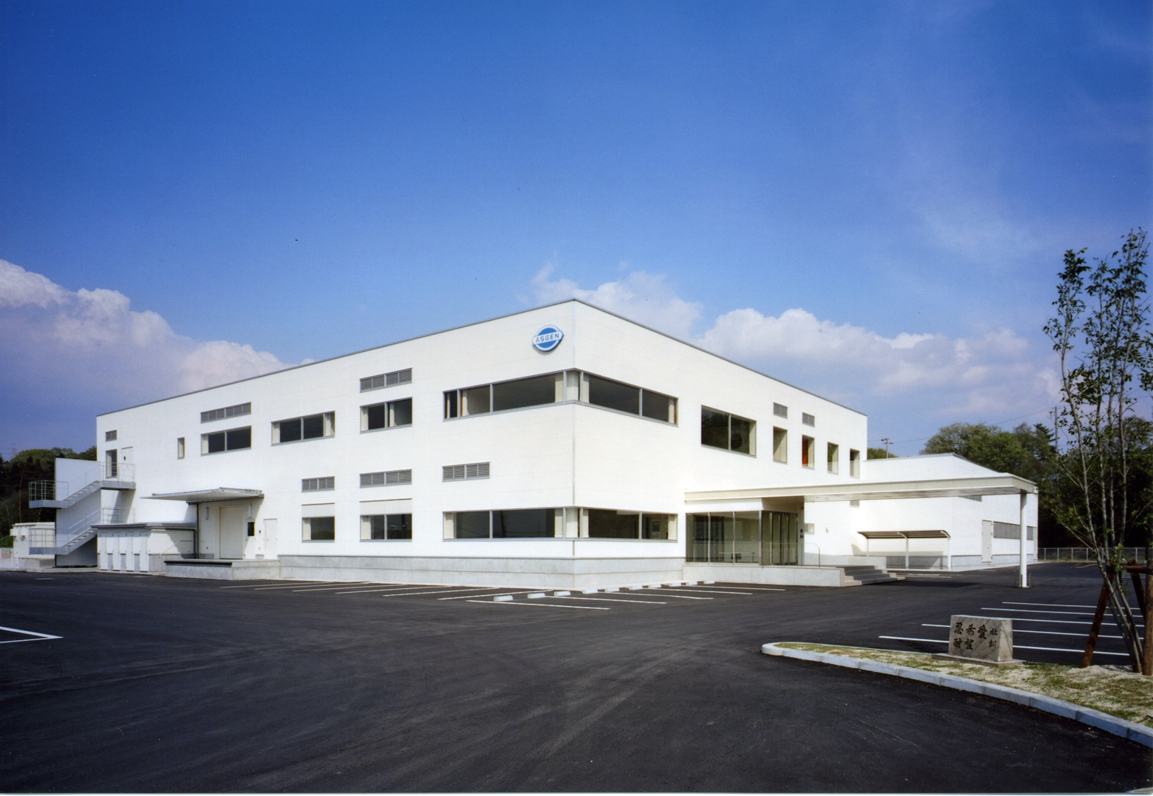 アスゲン製薬株式会社本社・工場